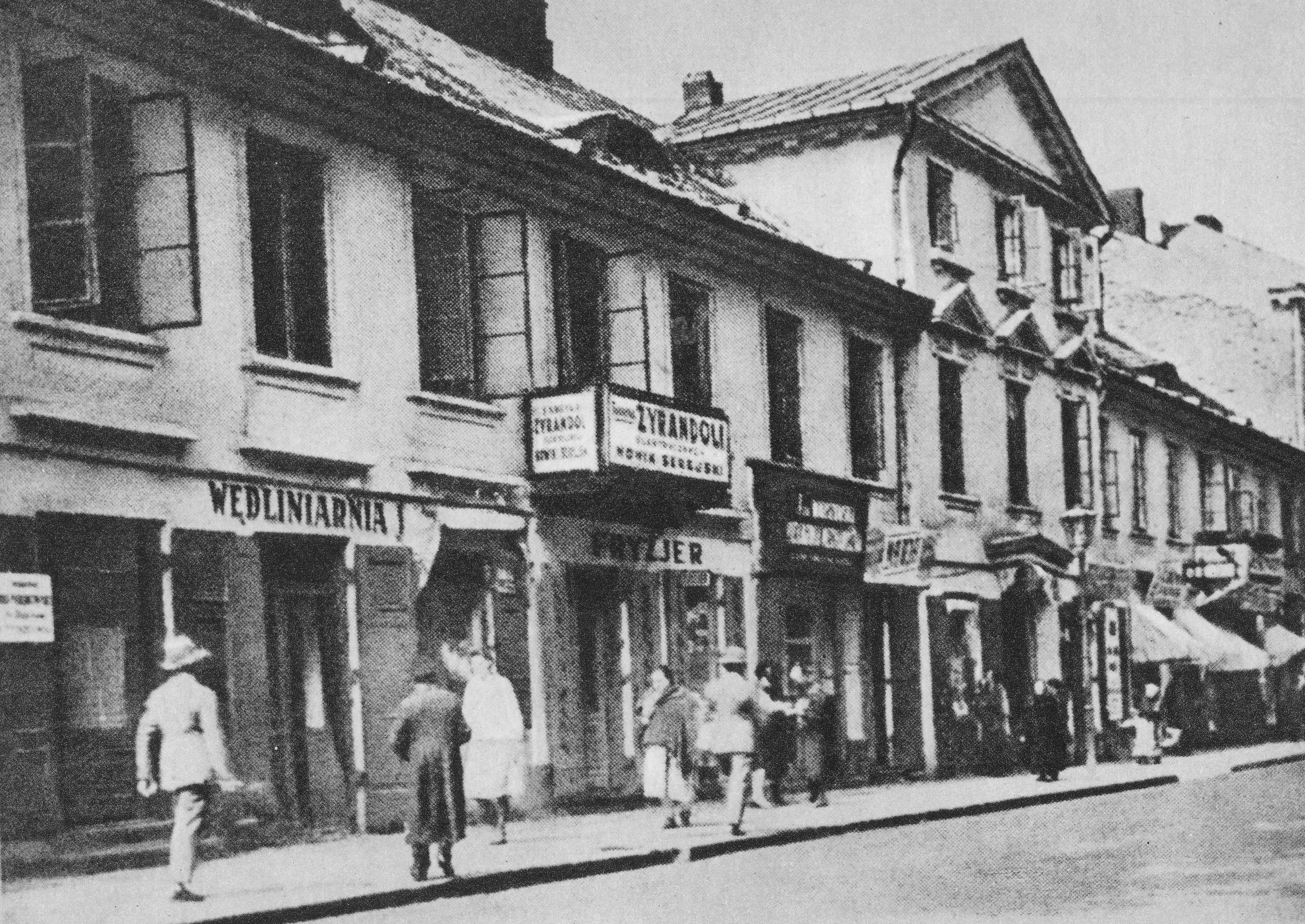 Kamienica przy ul. Elektoralnej 20 w Warszawie w okresie międzywojennym